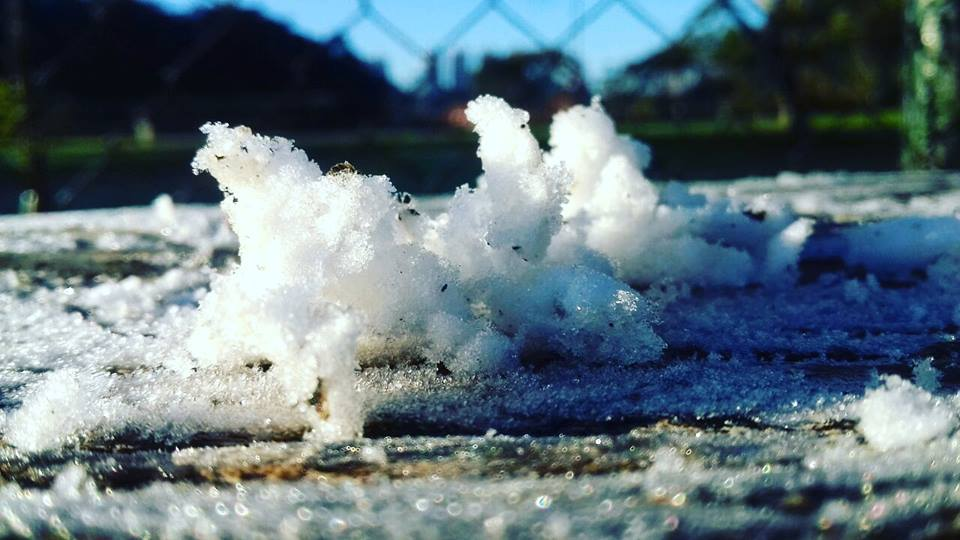 geada